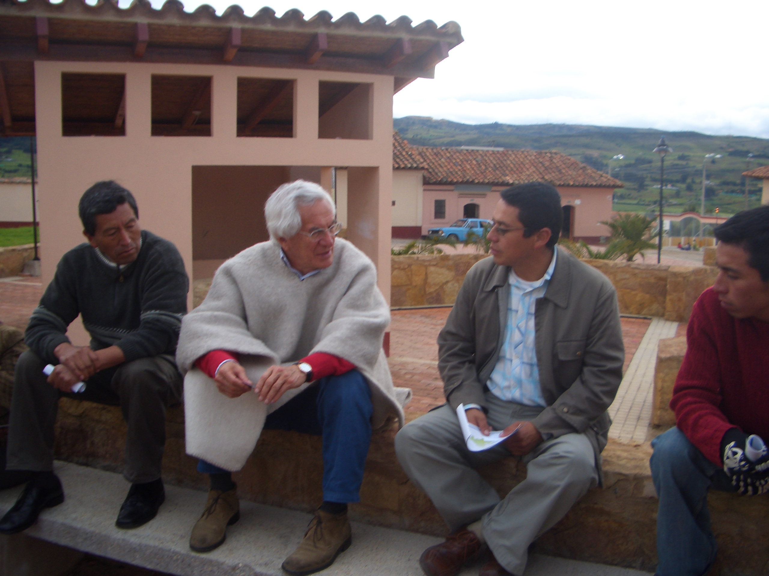 Foto tomada en el municipio de Oicatá